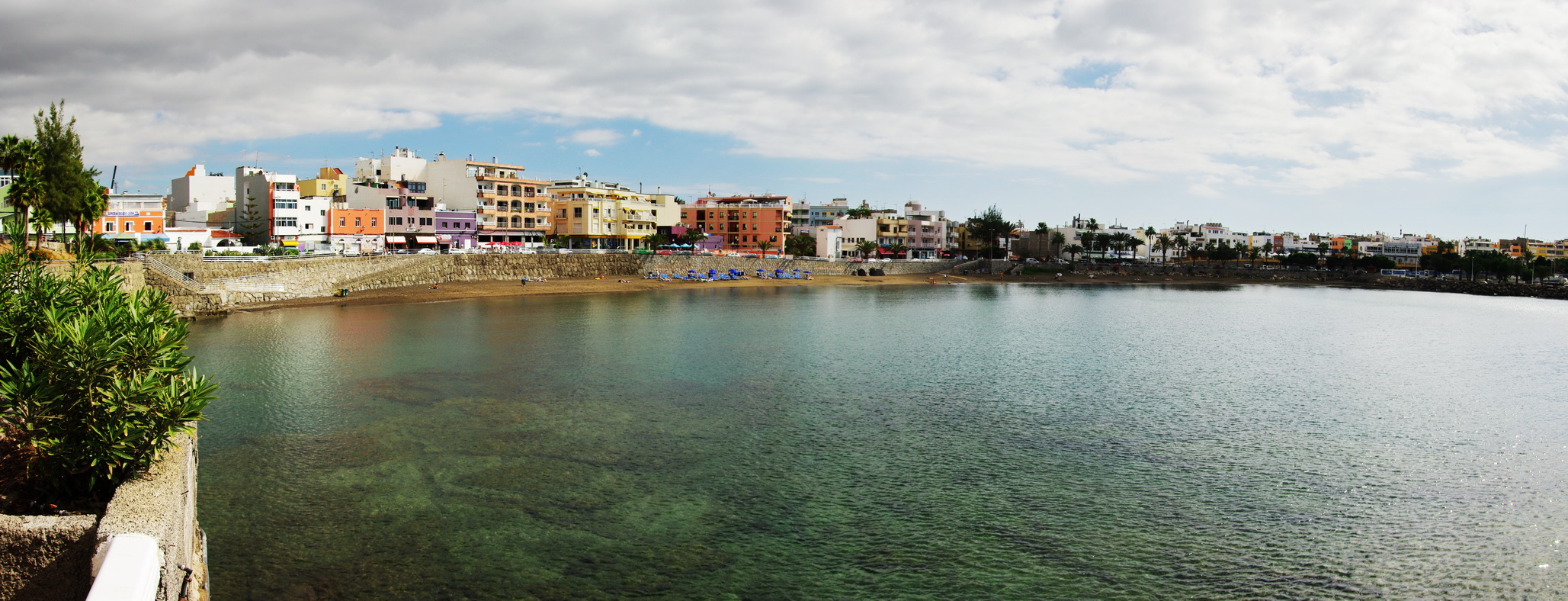 Hafen Arguineguín, Gran Canaria